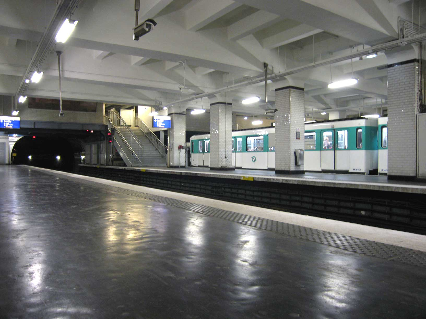 Description : Station Porte de Saint-Cloud sur la ligne 9 du métro Place : Paris, France Date : 2006 Author : Pline photo personnelle